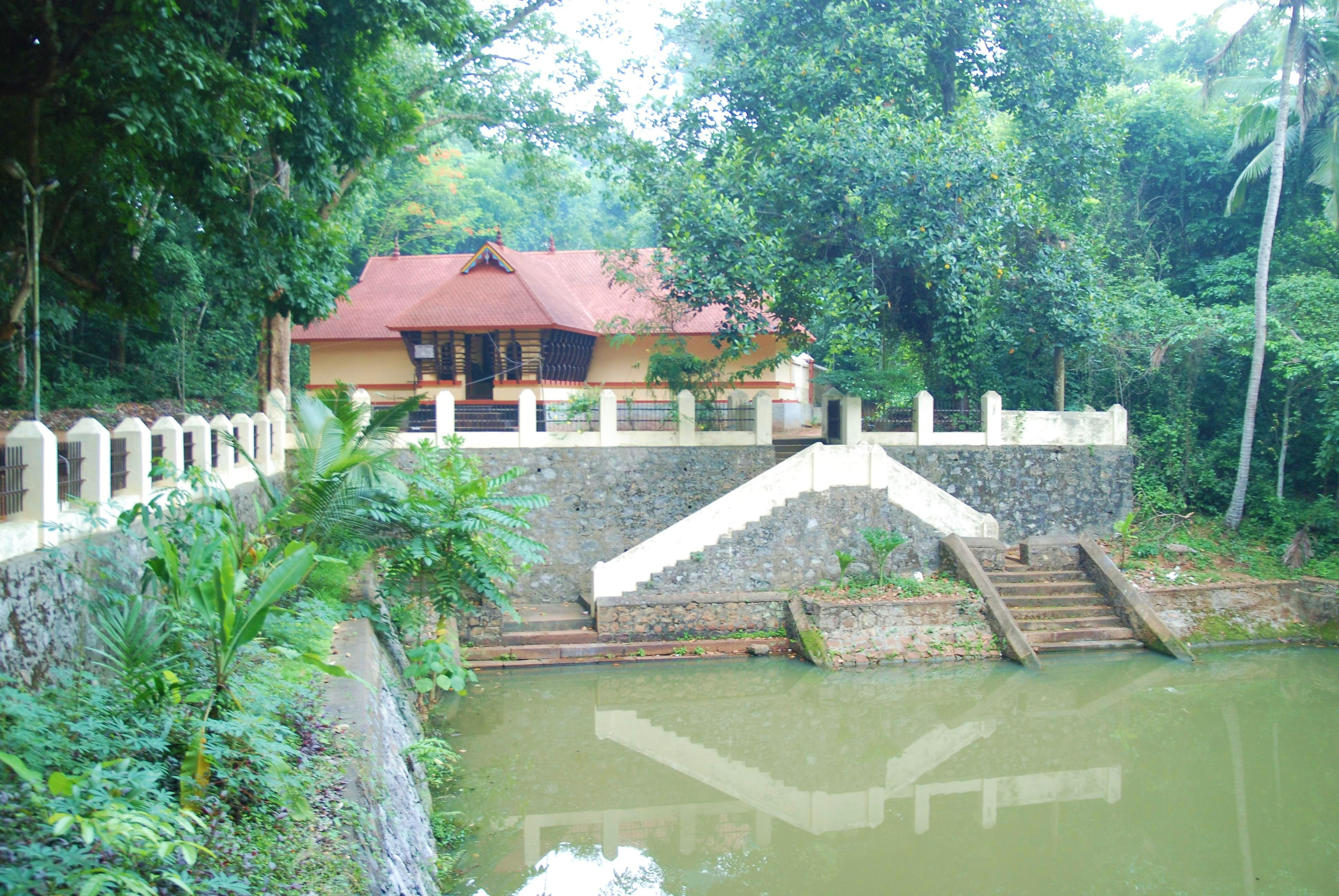 തലവൂർ ശ്രീ മഹാദേവ ക്ഷേത്രം